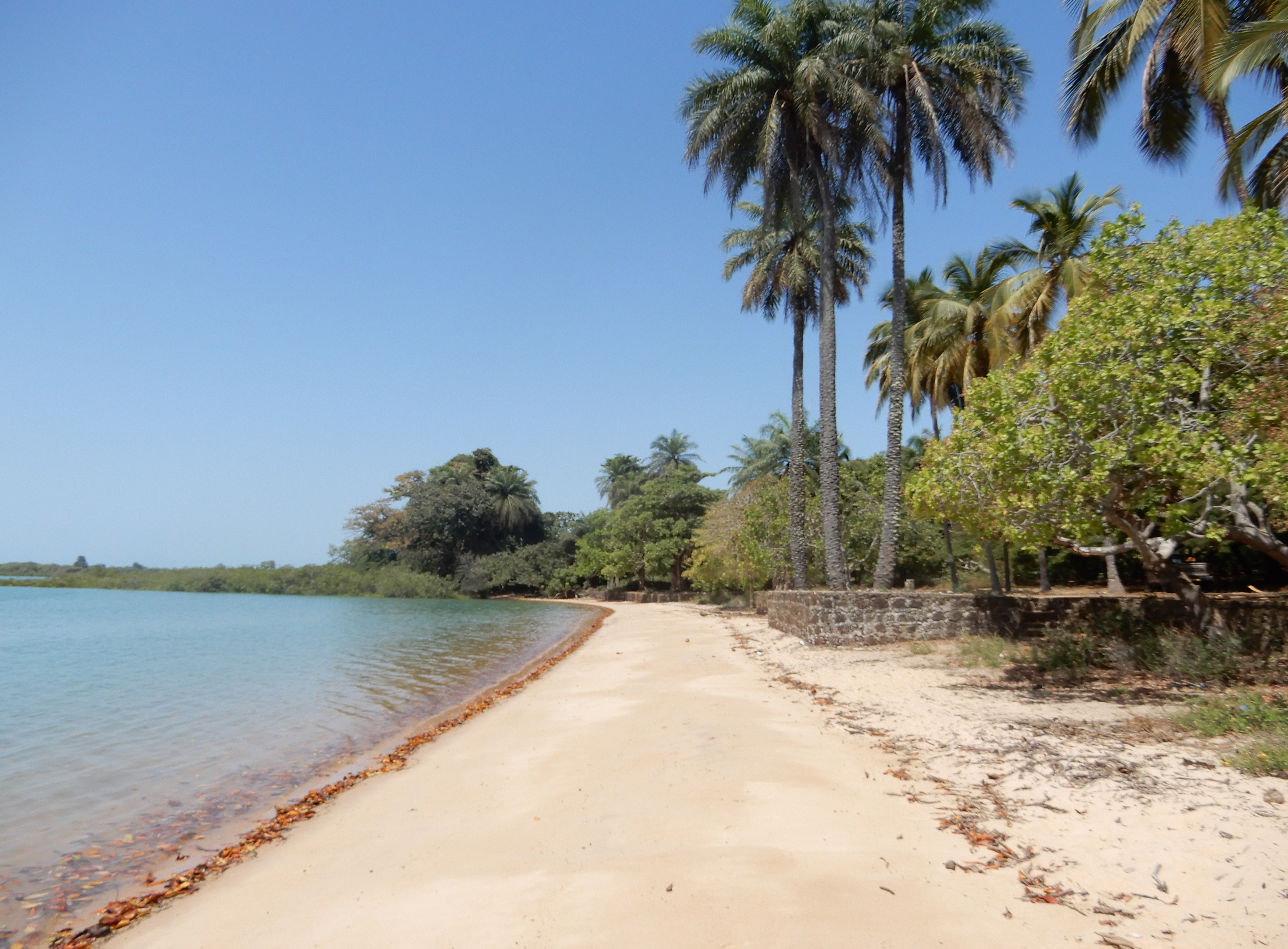 Praia de Ofir, Bolama, Guiné-Bissau